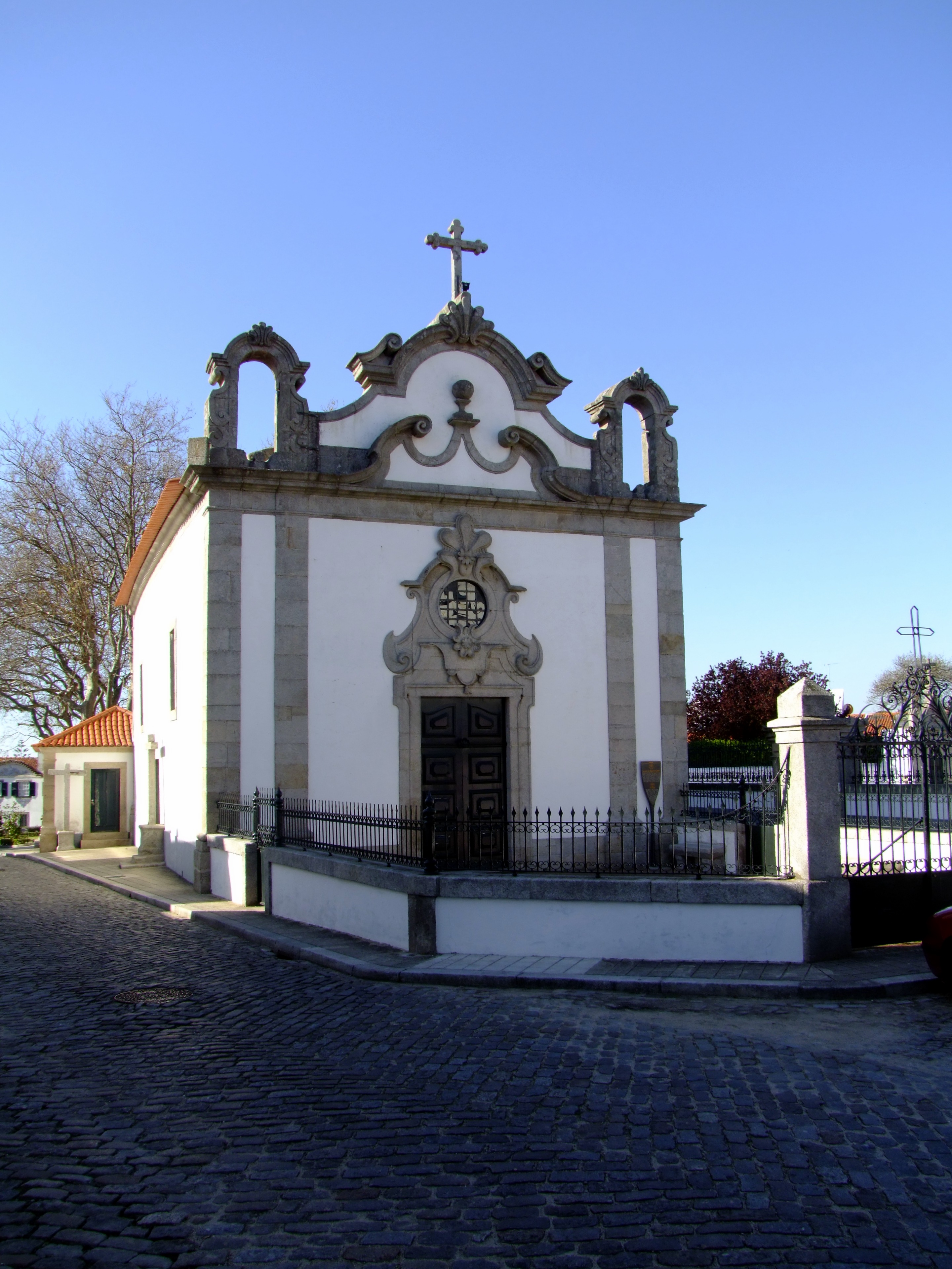 Igreja de São Miguel de Nevogilde, na freguesia de Nevogilde, Porto